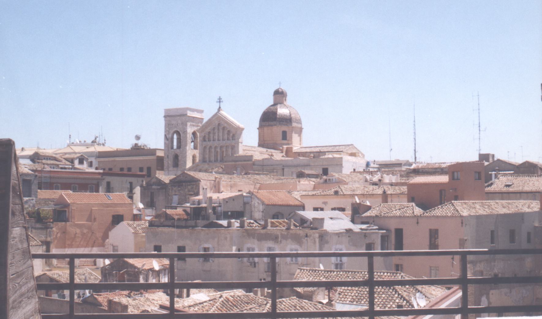 Cagliari, la cattedrale e i tetti di Castello visti dalla torre dell'Elefante